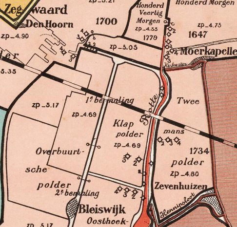 Klappolder